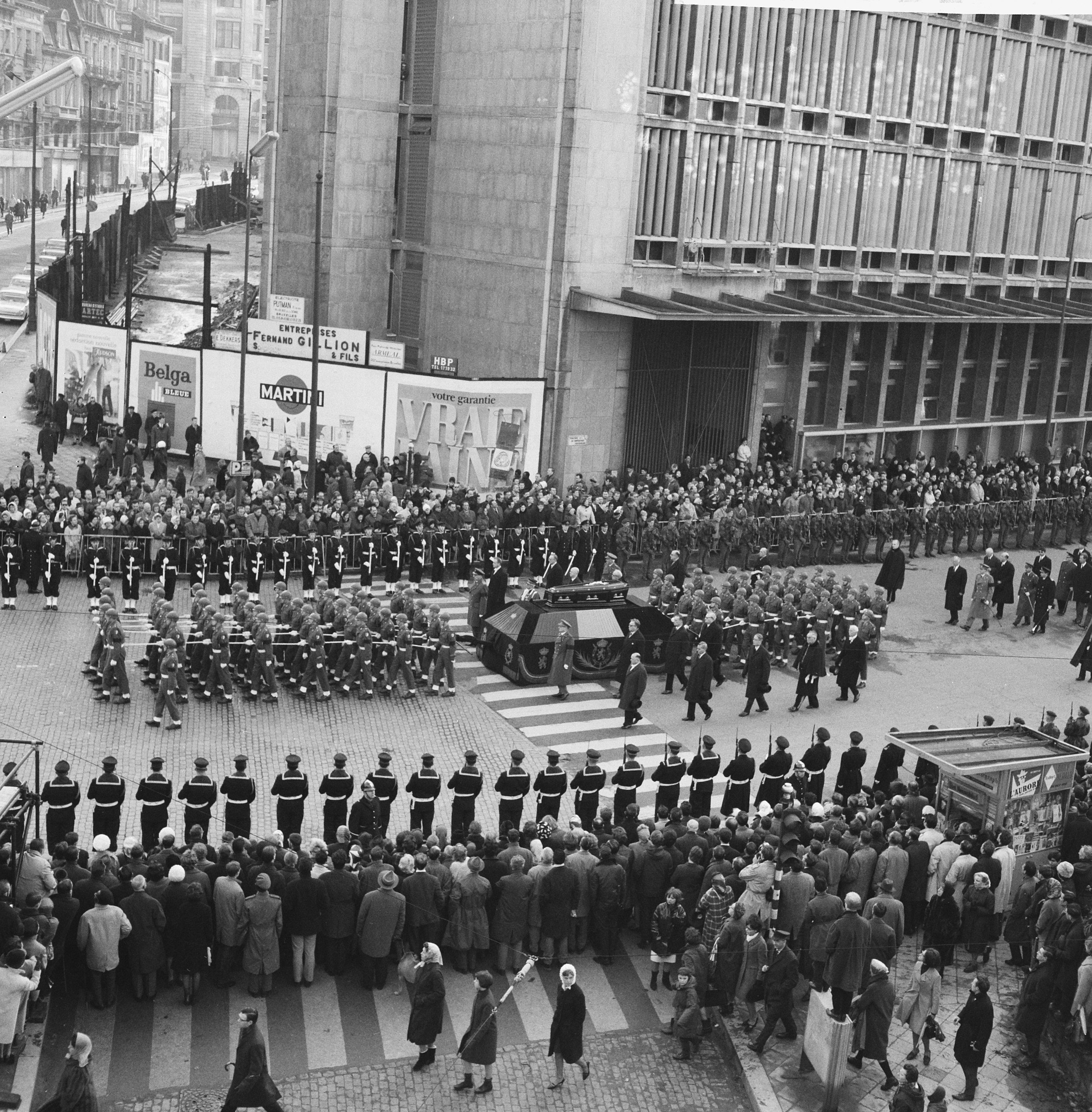 Collectie / Archief : Fotocollectie Anefo Reportage / Serie : [ onbekend ] Beschrijving : Begrafenis van Koningin Elizabeth van België te Brussel; het stoffelijk overschot bij het passeren van publiek en soldaten in het gelid Datum : 30 november 1965 Locatie : België, Brussel Trefwoorden : begrafenissen, begrafenissen, militairen, plechtigheden, vorstenhuizen Persoonsnaam : Elizabeth, koningin van België Fotograaf : Nijs, Jac. de / Anefo Auteursrechthebbende : Nationaal Archief Materiaalsoort : Negatief (zwart/wit) Nummer archiefinventaris : bekijk toegang 2.24.01.03 Bestanddeelnummer : 918-5099